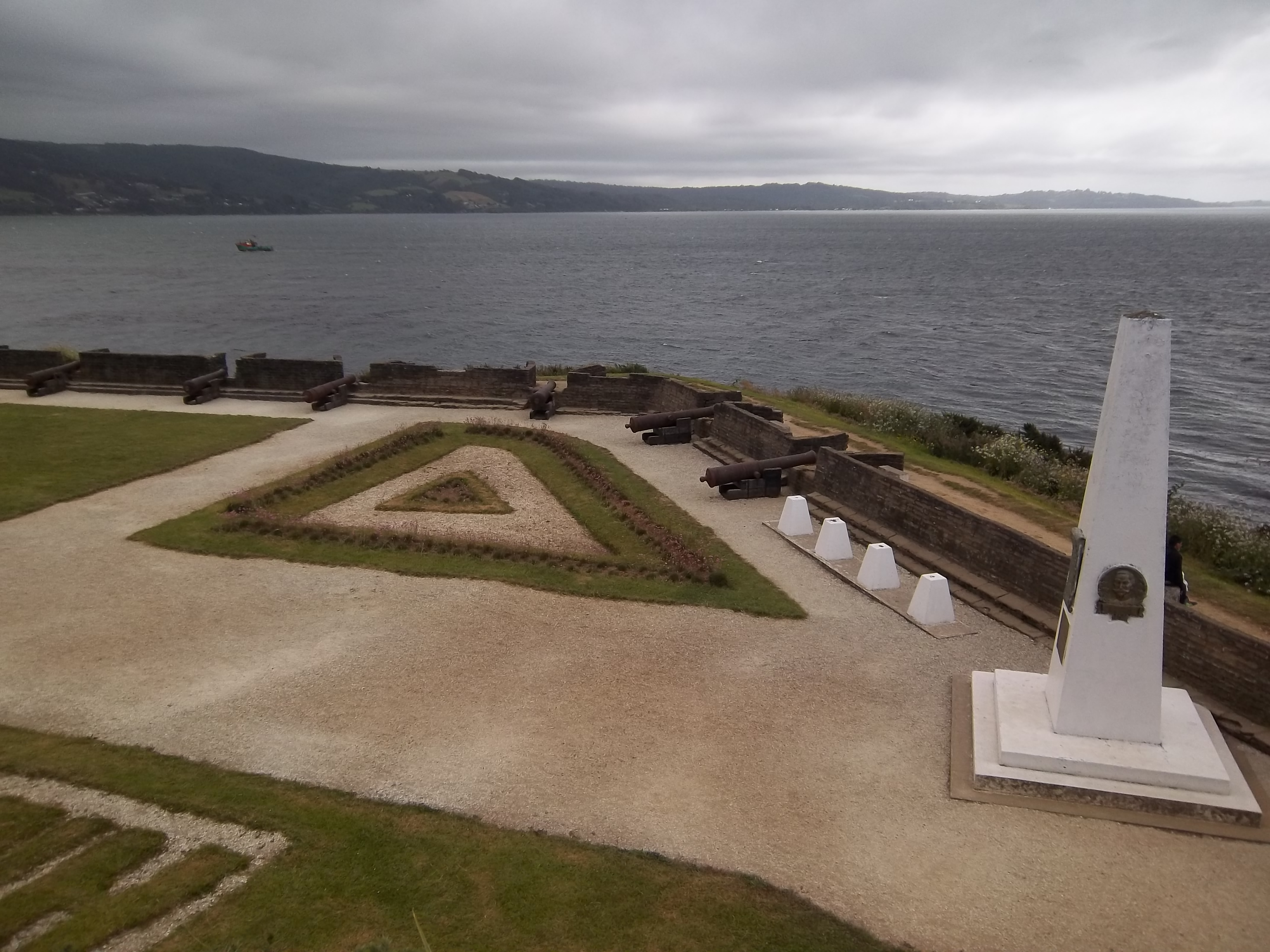 Fuerte San Antonio en Ancud, Chiloé, X Región, Chile.